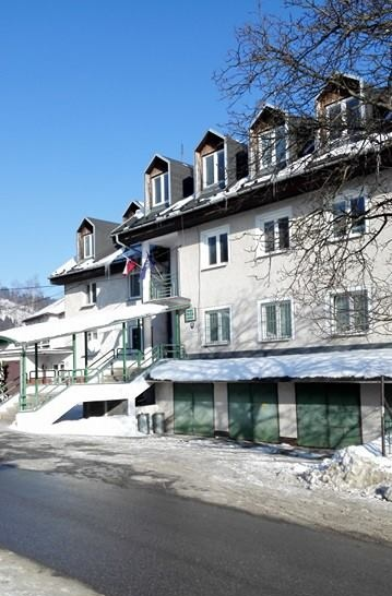 obvodné oddelenie Policajného zboru SR v Krásne nad Kysucou